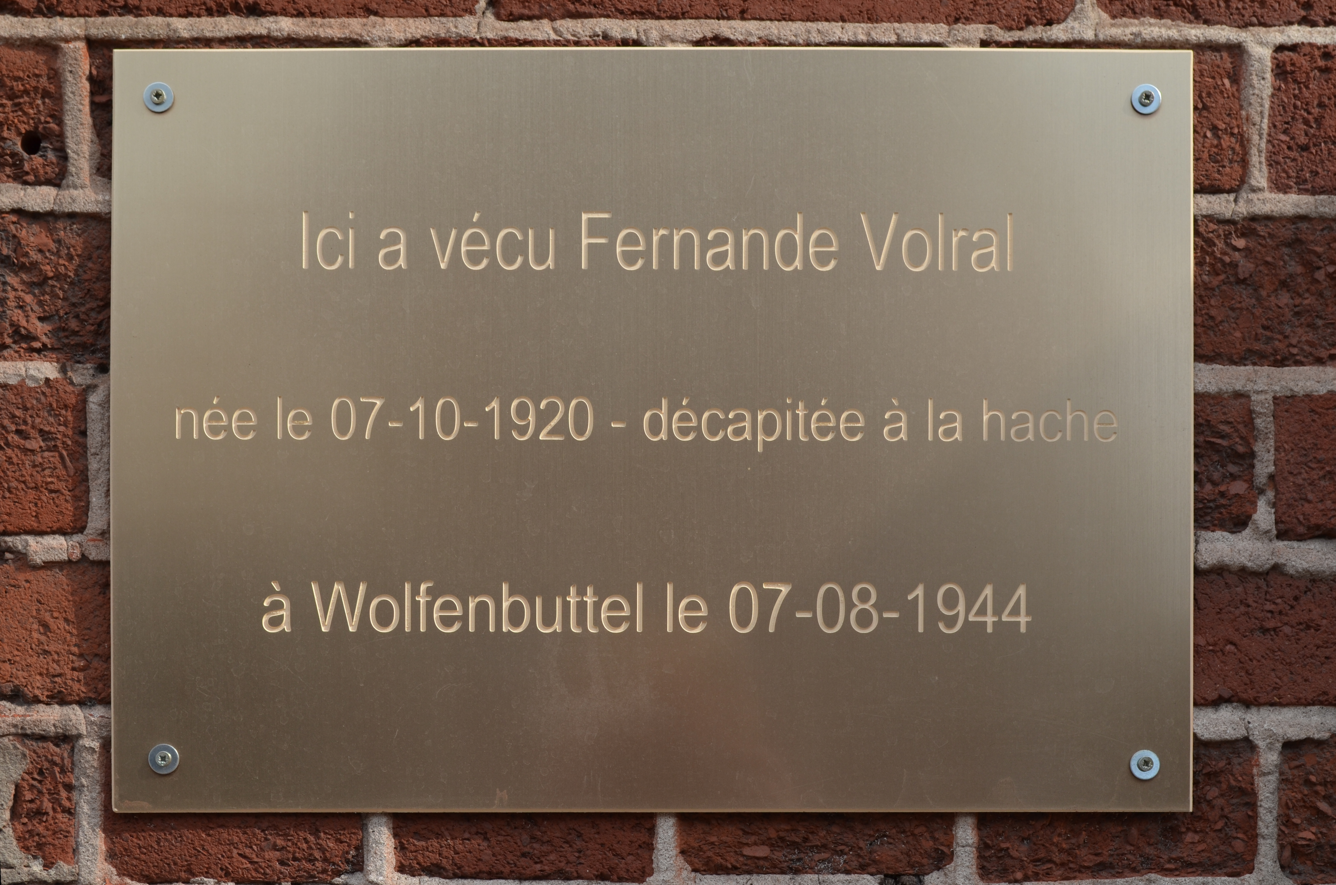 Charleroi (Belgique) - plaque pour Fernande Volral - avenue des Alliées